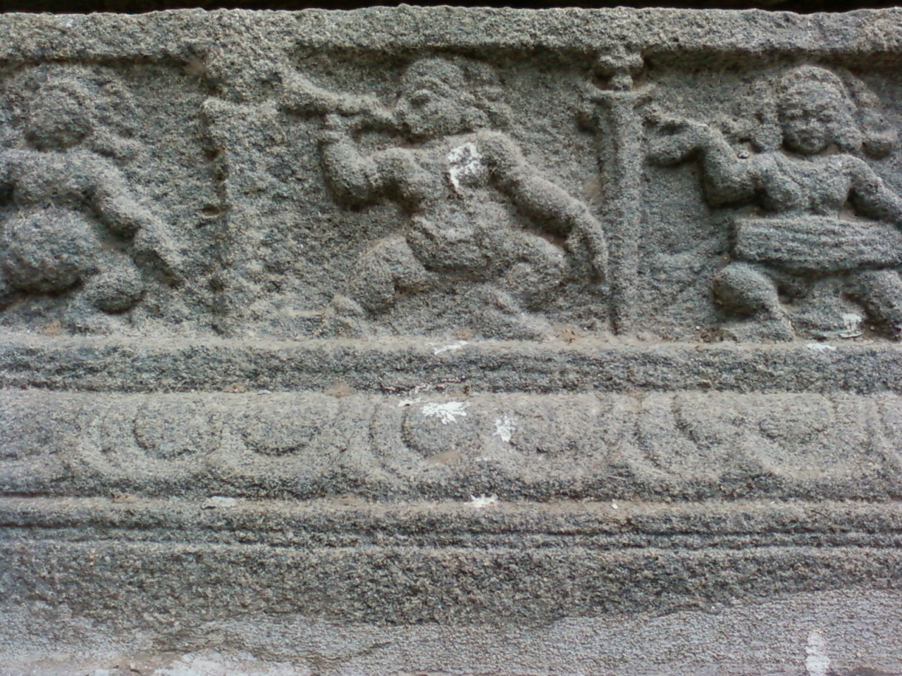 திருவண்ணாமலை அண்ணாமலையார் கோயில் சுற்றுச்சுவர்களின் உள்பக்கத்தில் செதுக்கப்பட்டுள்ள வகைமாதிரியான சிற்பம்.இசைவாணர்கள் வாத்தியக் கருவிகள் இசைக்கும் காட்சி செதுக்கப்பட்டுள்ளது.